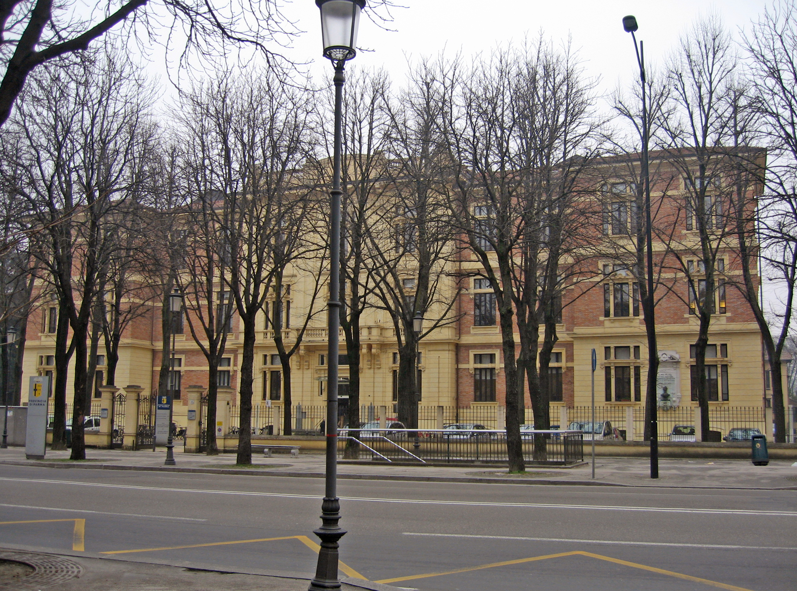 Palazzo Giordani (Parma) - facciata principale